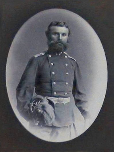 Молодой лейтенант Стеван Бинички